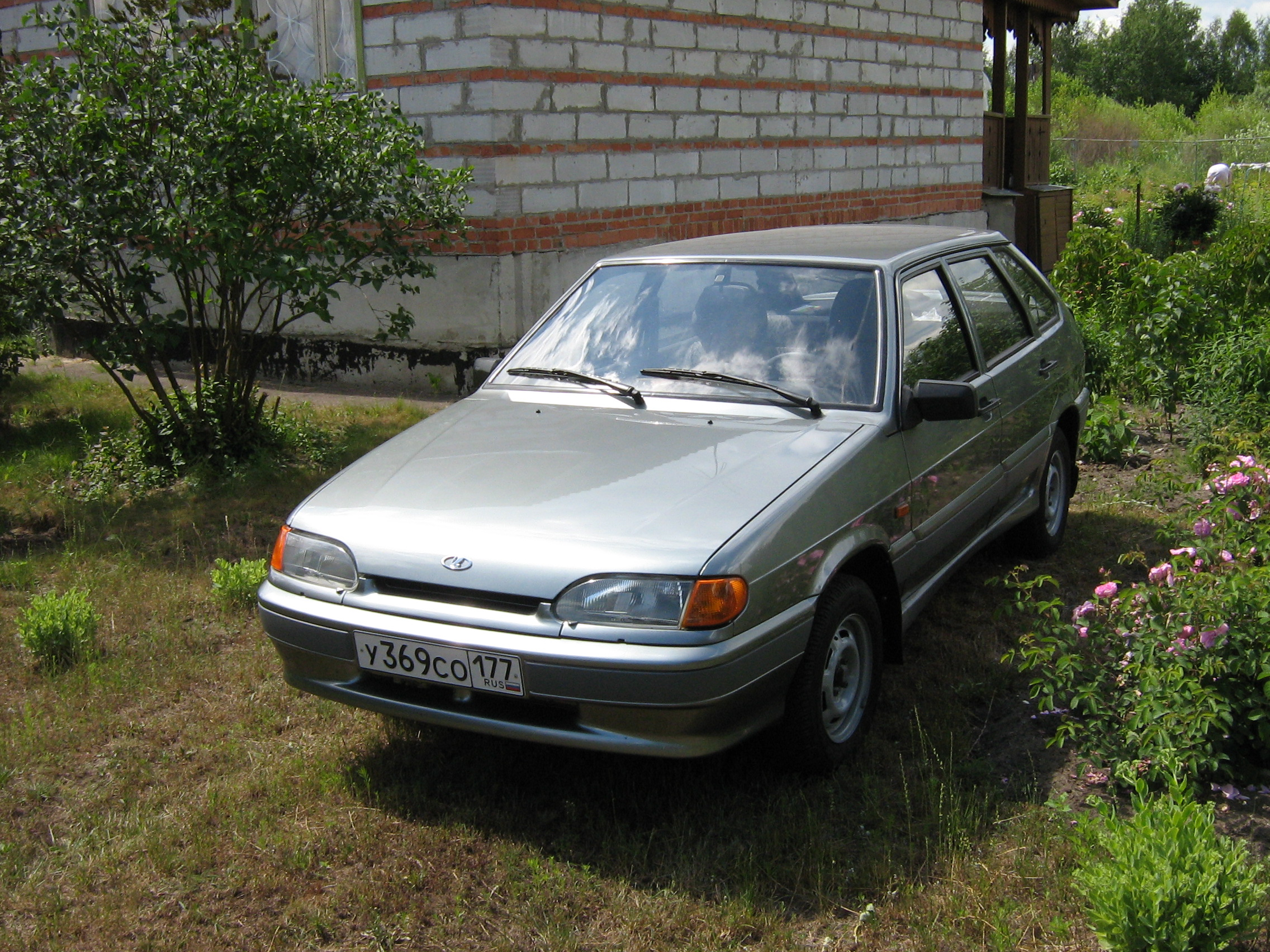 ВАЗ-2114 2007 года выпуска